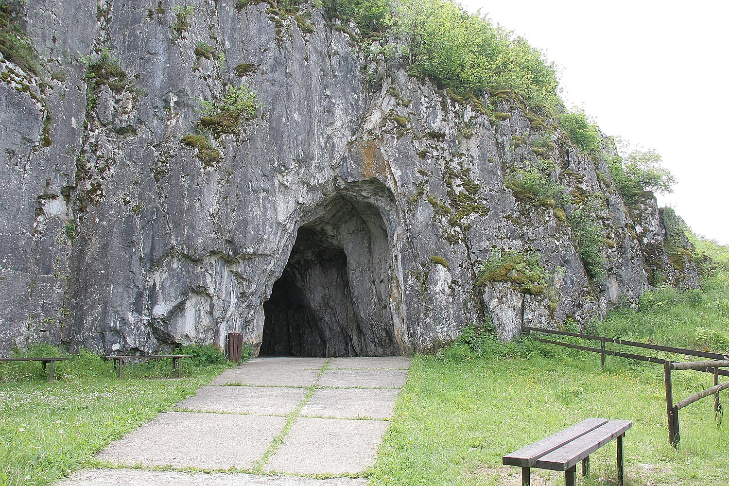 Jeskyně Balcarka u Ostrova u Macochy v Moravském Krasu